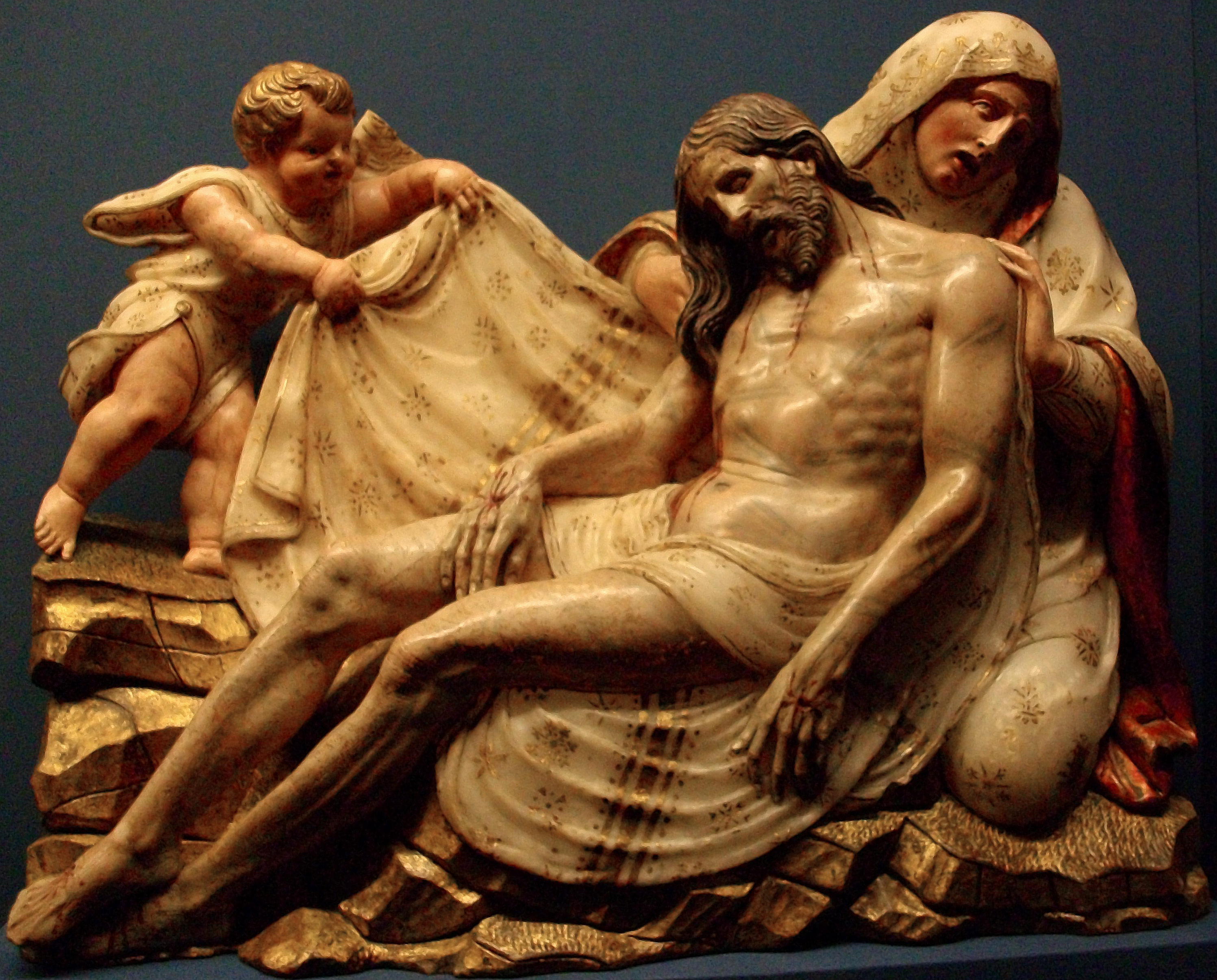 Piedad (1522-1525), de Damián Forment. Alabastro dorado y policromado, 40 x 50 x 20 cm. Procede del Retablo de Santa Ana, San Jerónimo y San Martín de la Catedral de Huesca. Pertenece al Obispado de Huesca. Obra expuesta en 2009 y 2010 en la exposición itinerante «El esplendor del Renacimiento en Aragón» en el Museo de Bellas Artes de Bilbao, el Museo de Bellas Artes de Valencia y el Museo de Zaragoza.